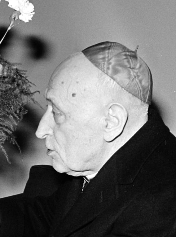 Mindszenty József 1974-ben, eredeti nevén Pehm József (Csehimindszent, 1892. március 29. – Bécs, 1975. május 6.) Esztergom érseke, Magyarország utolsó hercegprímása, bíboros